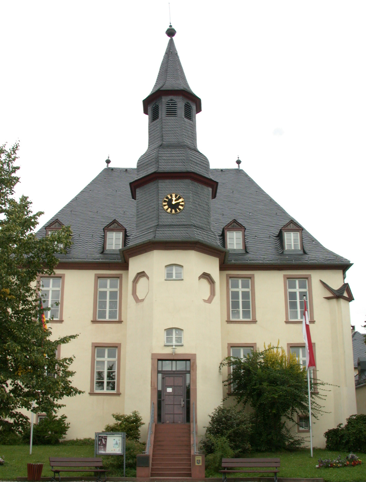 Die Hugenottenkirche